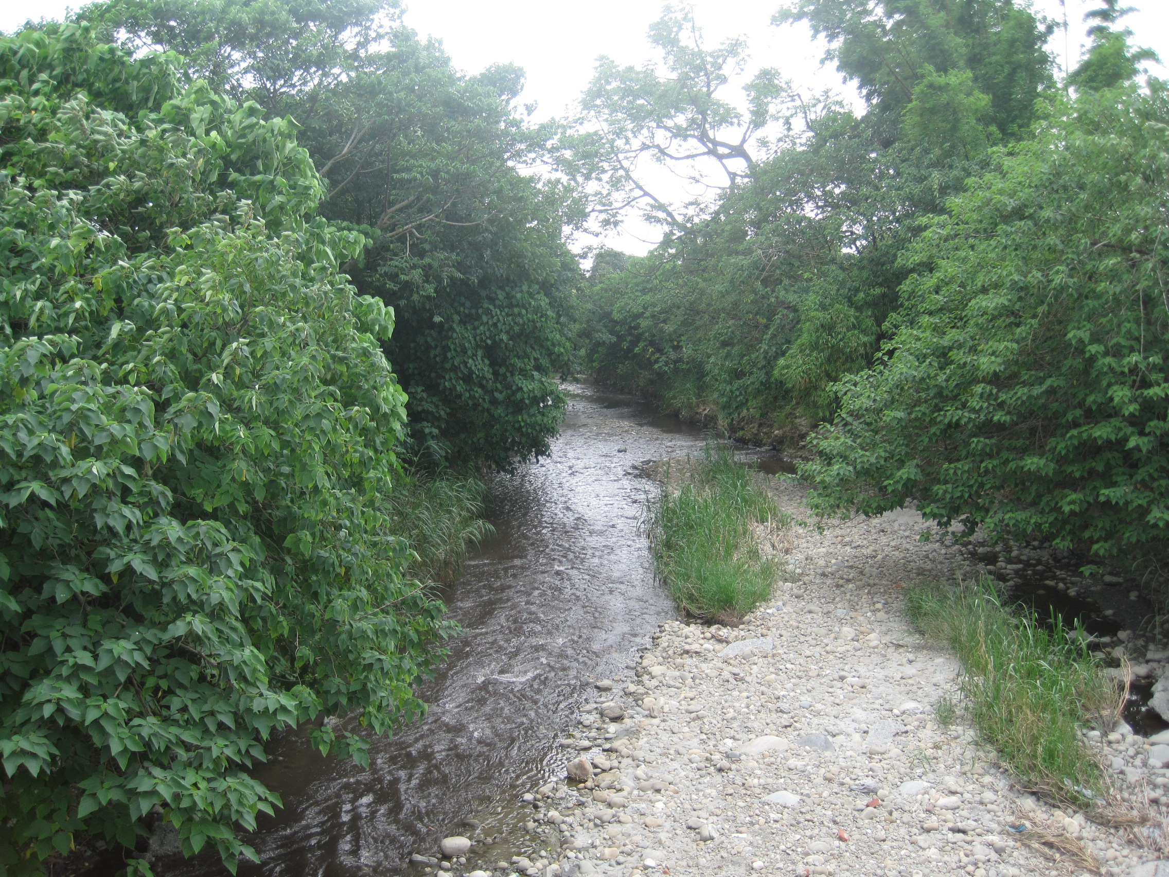 雲林縣斗六市中興路上的石榴班溪（雅聞峇里海岸觀光工廠附近）。